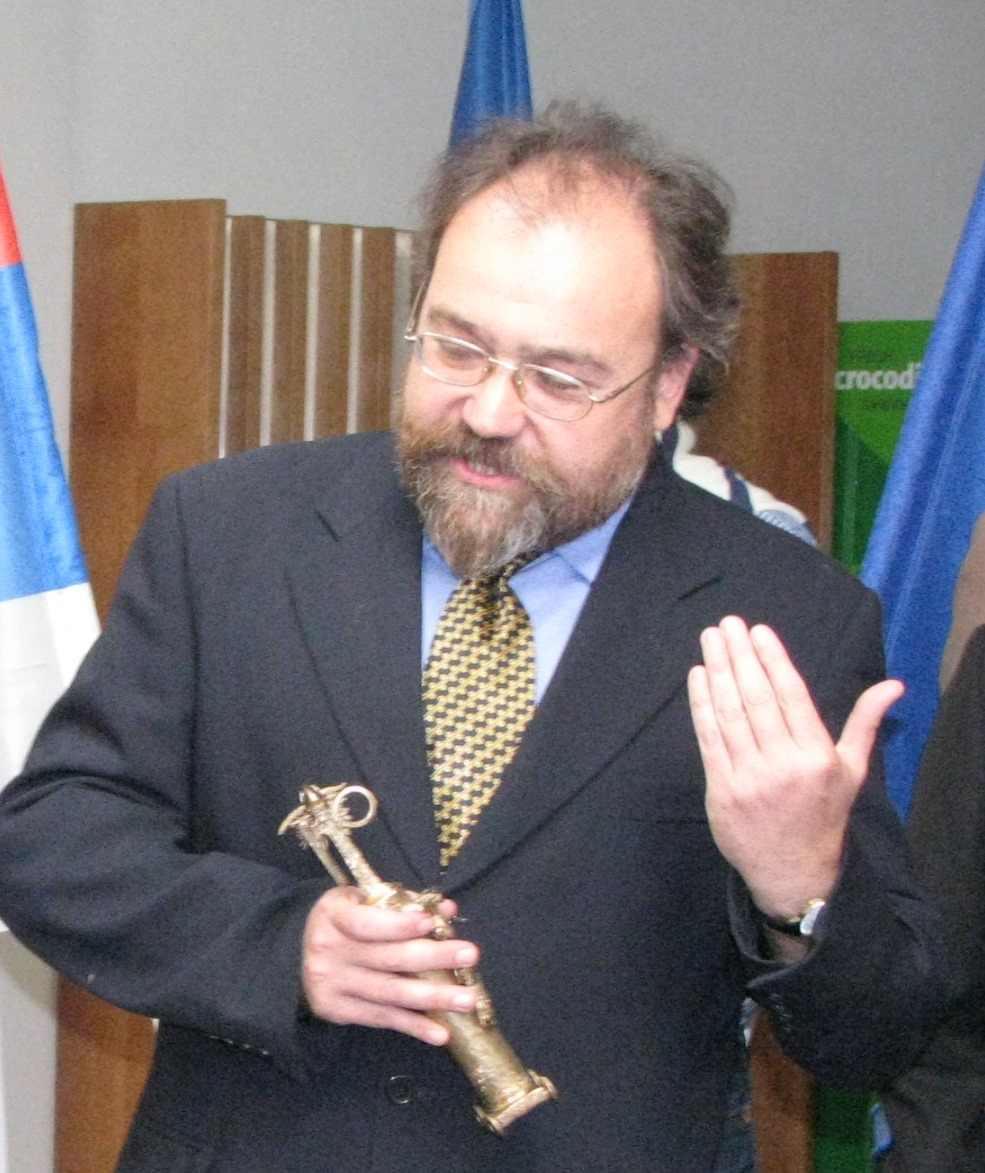 Václav Štěpánek (2010)